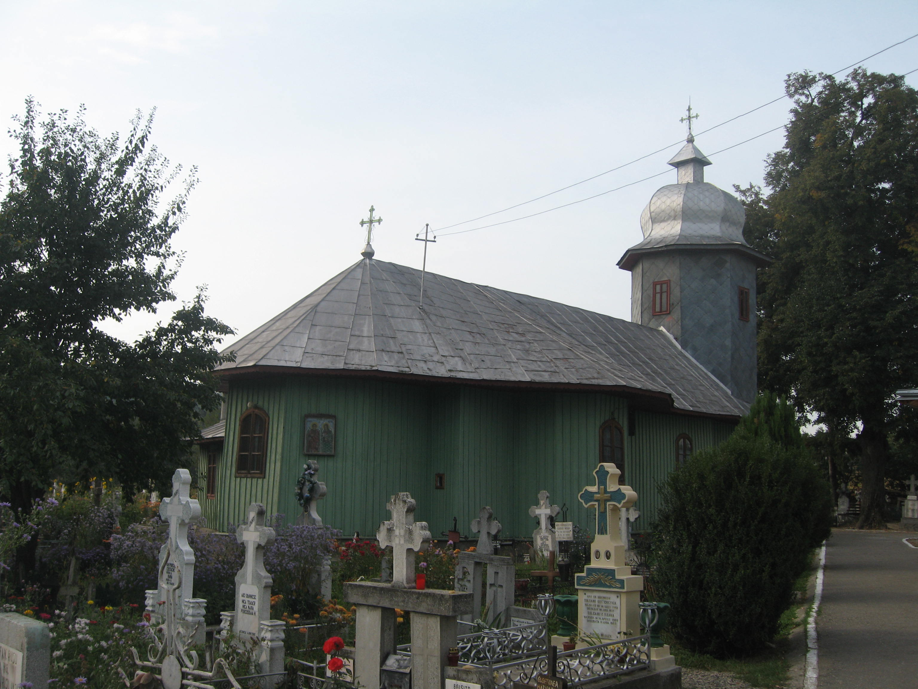 Biserica de lemn Sfinţii Voievozi din Bogdăneşti, Suceava